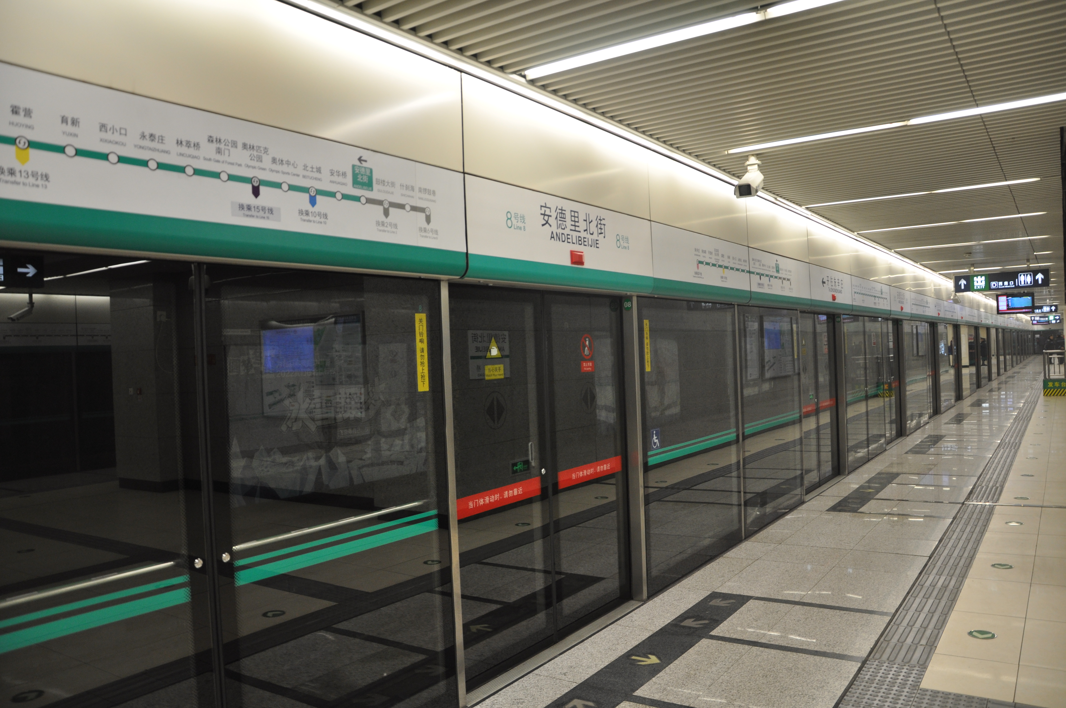 北京地铁8号线安德里北街站站台